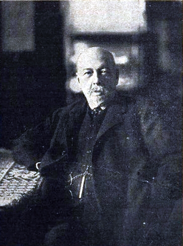 Князь Владимир Петрович Мещерский, русский журналист и издатель.